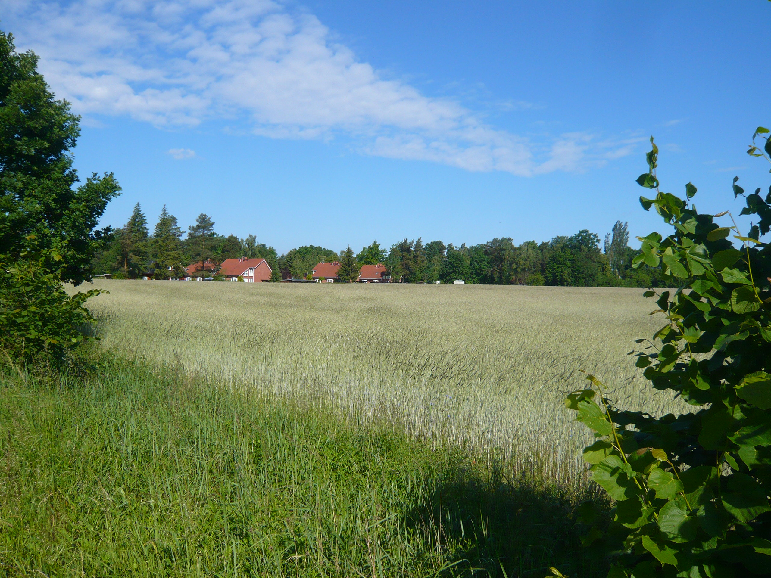 Rahmer See Wandlitz, Teil der Wandlitzer Siedlung